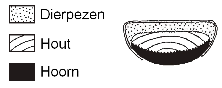 Nederlandstalige bewerking van Wikimedia Commonsbestand Crossection-pl.jpg